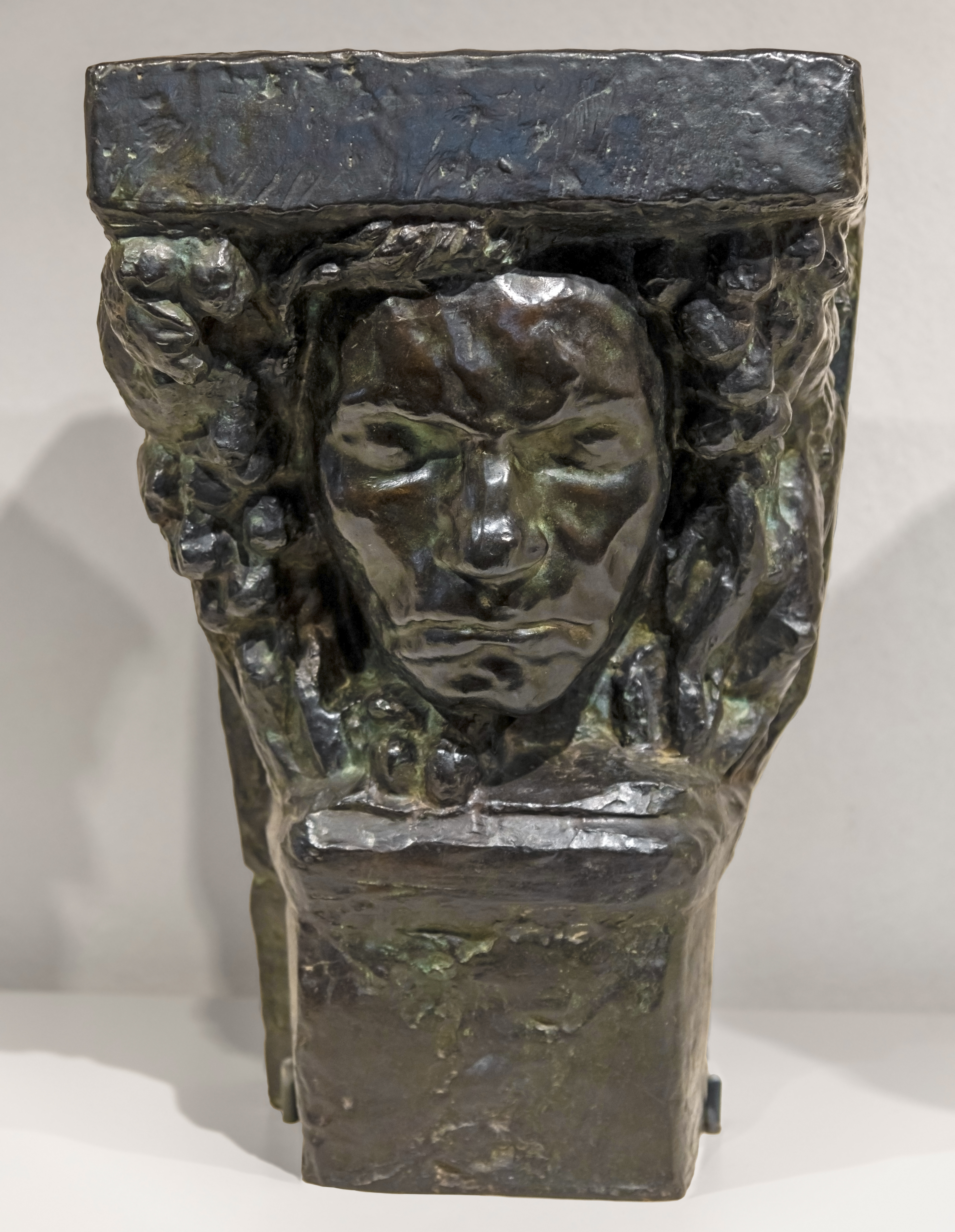 ©BYBOURDELLE (sur la base) ; GODARD 7 (au dos)